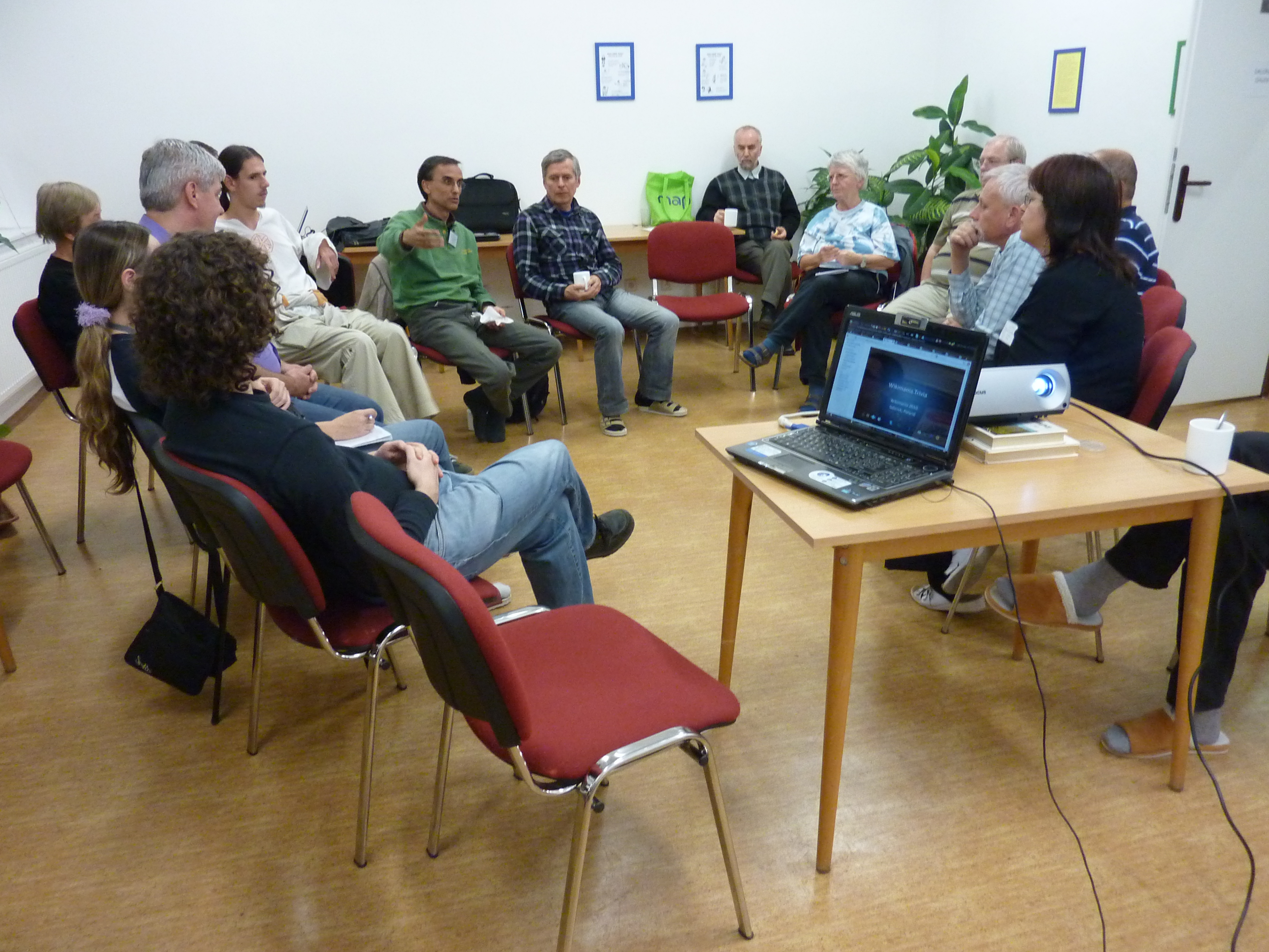 Konkluda diskuto dum Esperanta Vikimanio 2011 en Svitavy.